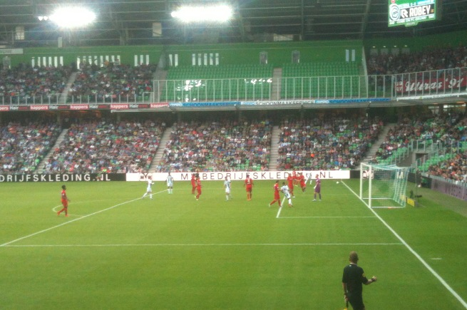 FC Groningen - FC Twente, eerste competitiewedstrijd seizoen 2015-16, 12 augustus 2015